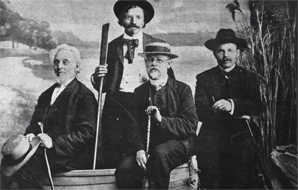 ביאליק, מנדלי, בן עמי ושלום עליכם.